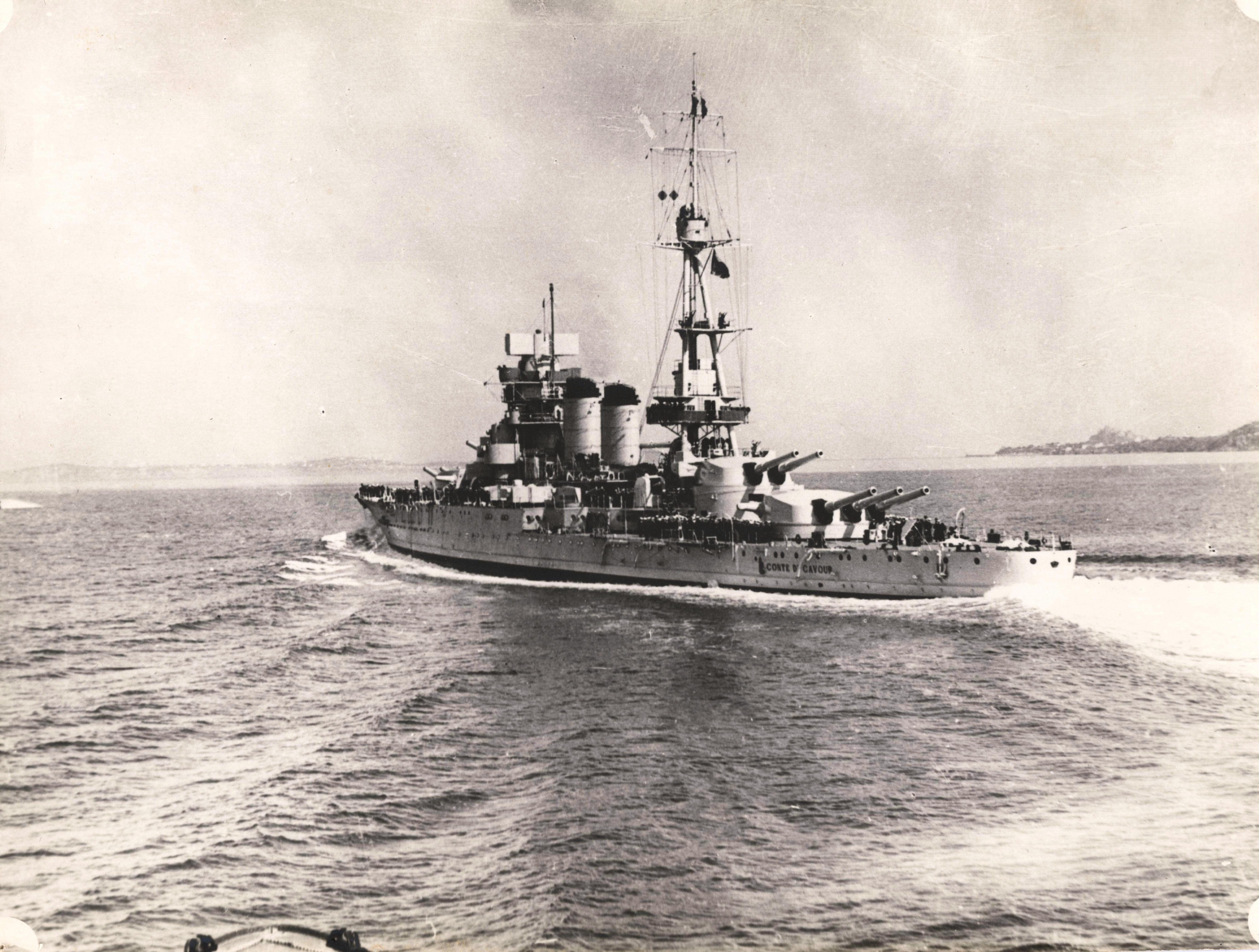 Regia Nave da Battaglia Corazzata Conte di Cavour